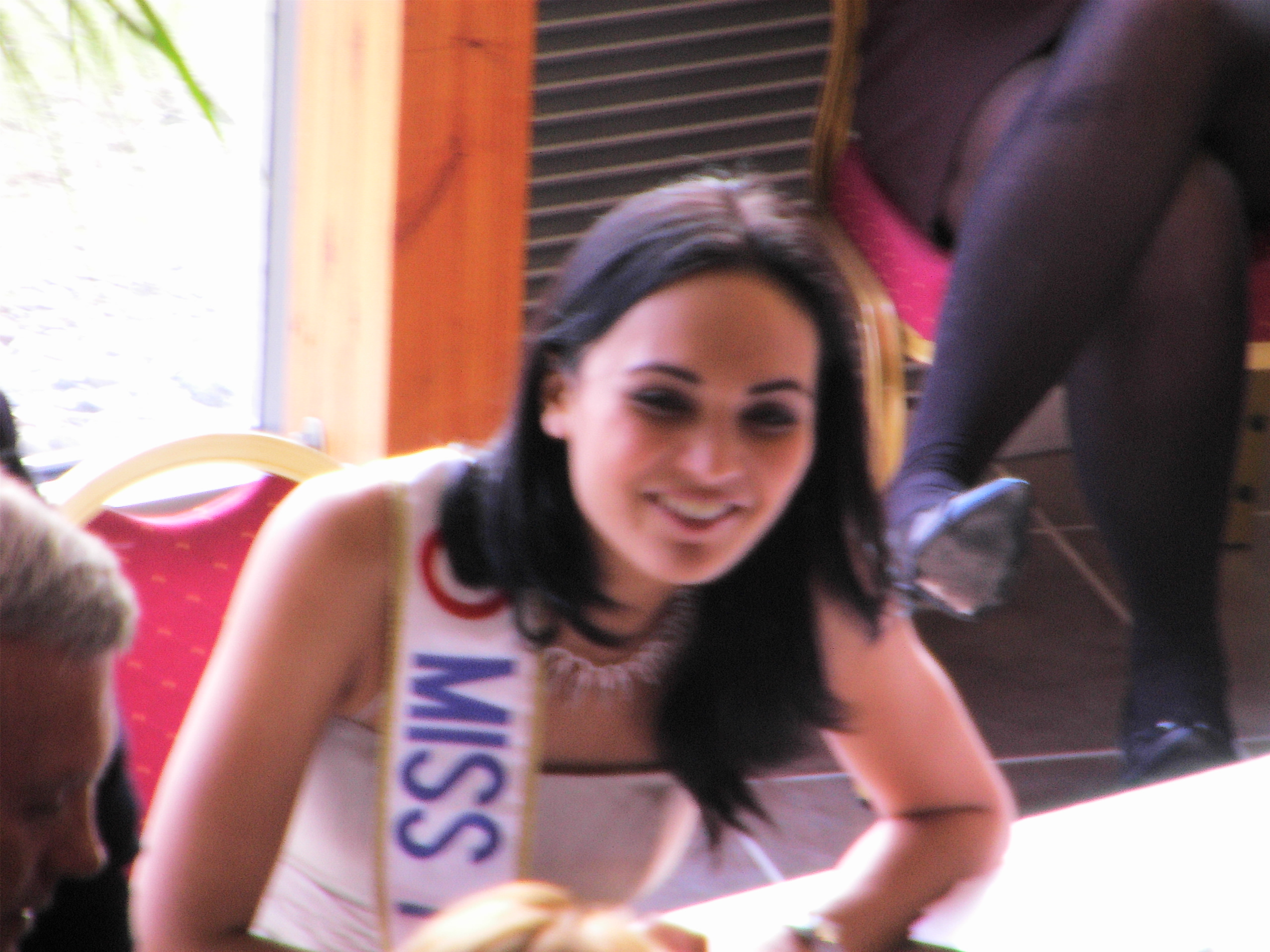 Valérie Bègue, née le 26 septembre 1985 à Saint-Pierre, a été élue Miss France 2008, avec l'écharpe de Miss Réunion le samedi 8 décembre 2007 au terme d'une soirée diffusée sur TF1 en direct de Dunkerque. Prise de vue le 13 janvier 2010 à l'hippodrome de Pau.